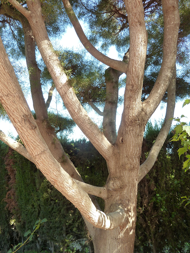 Tetraclinis articulata (Araar): Tronco y ramas principales ascendentes. - Parque de la Huerta, Albatera (Alicante, España).